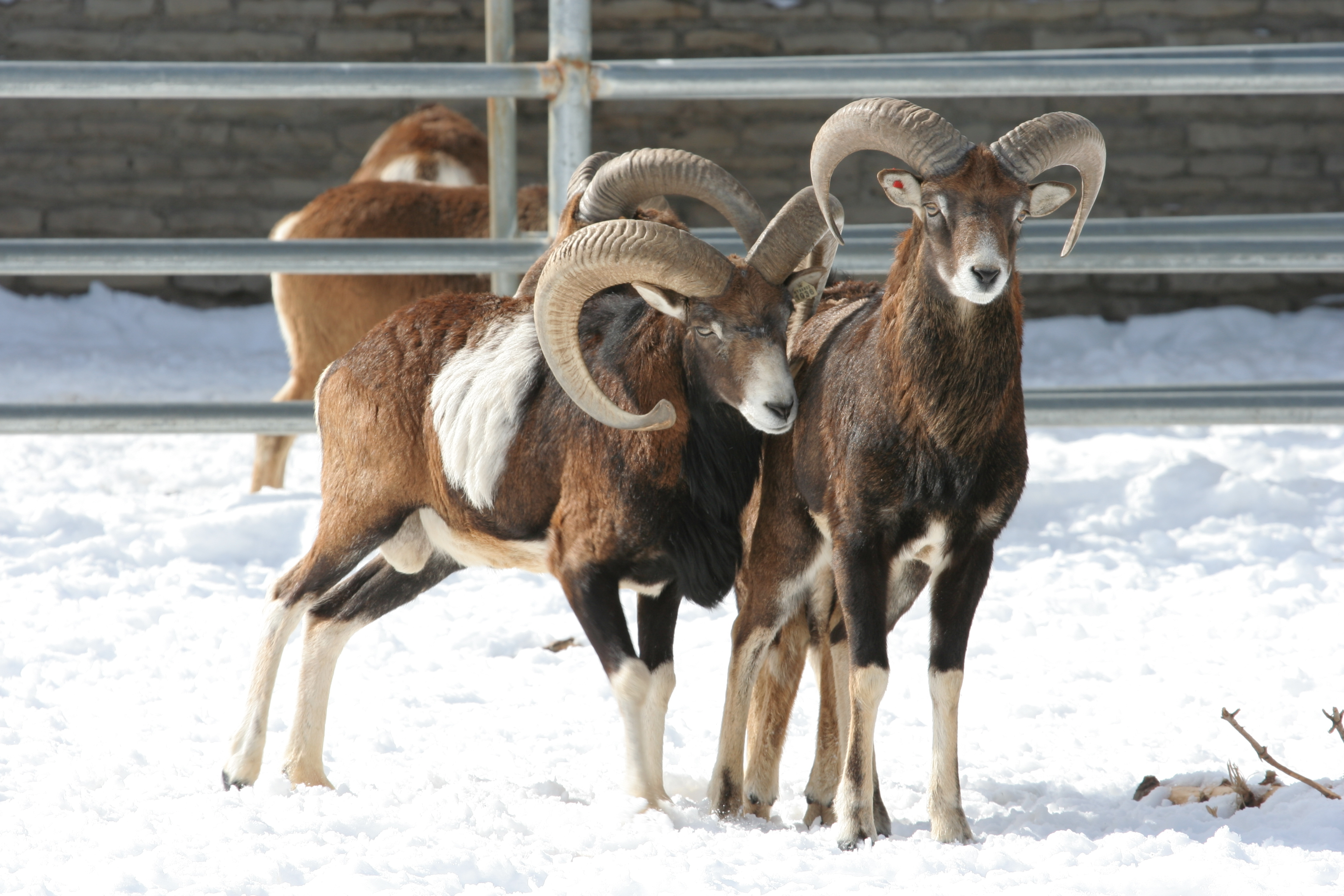 mouflon in zoo